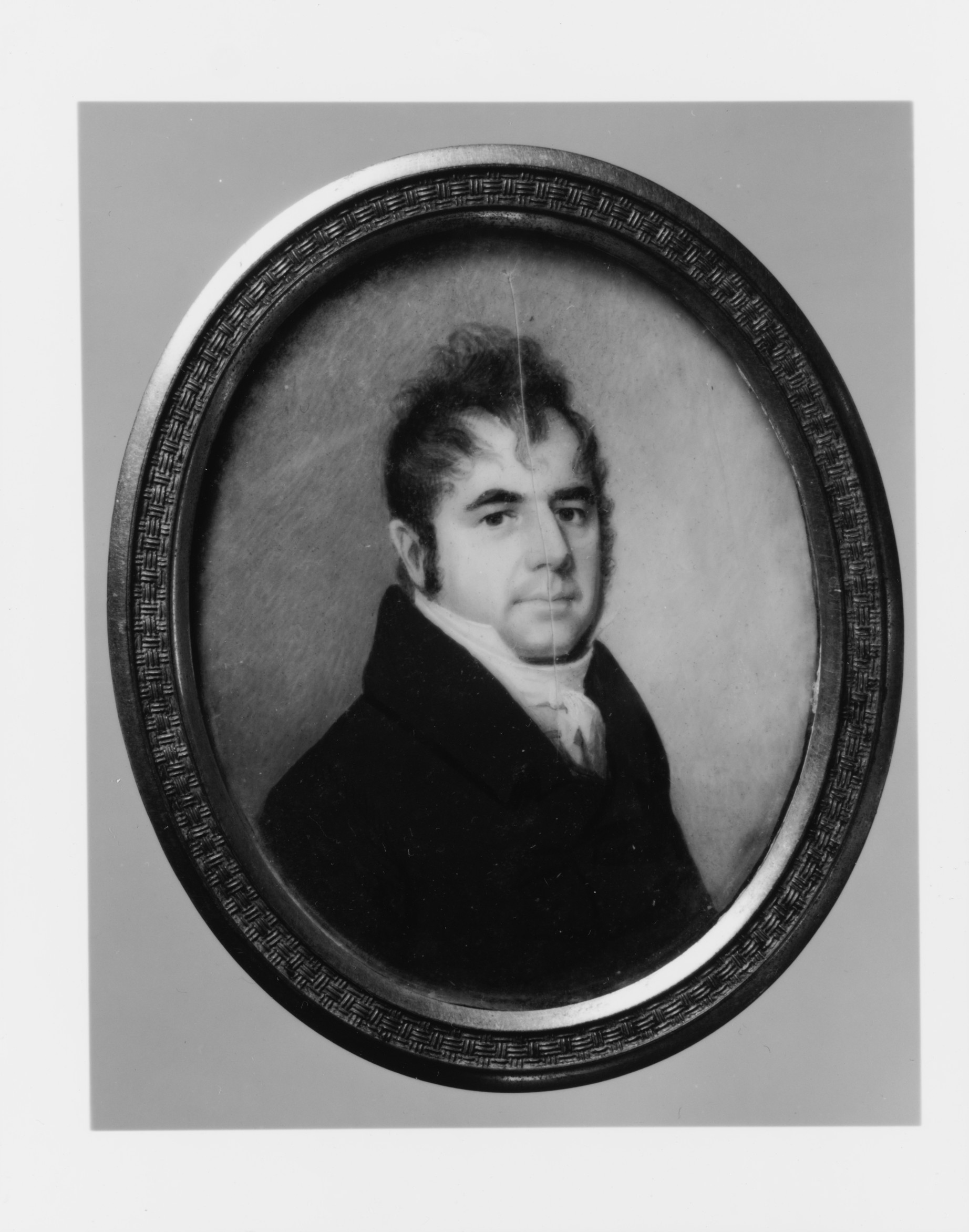 Painting, miniature; Paintings